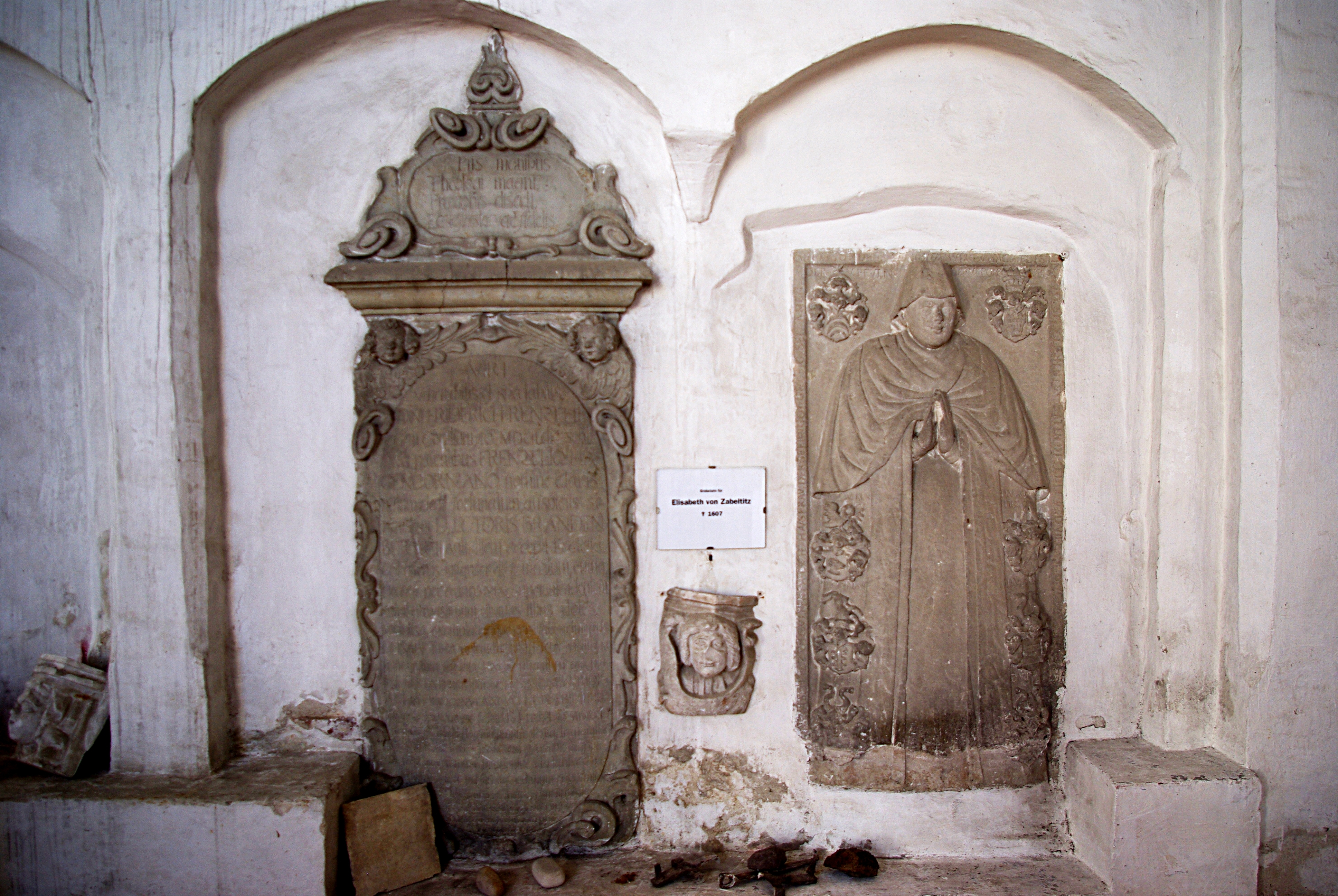 Cottbus in Brandenburg. Der Grabstein für Elisabeth von Zabeltitz steht in der Kirche St. Nikolai (Oberkirche) in Cottbus.